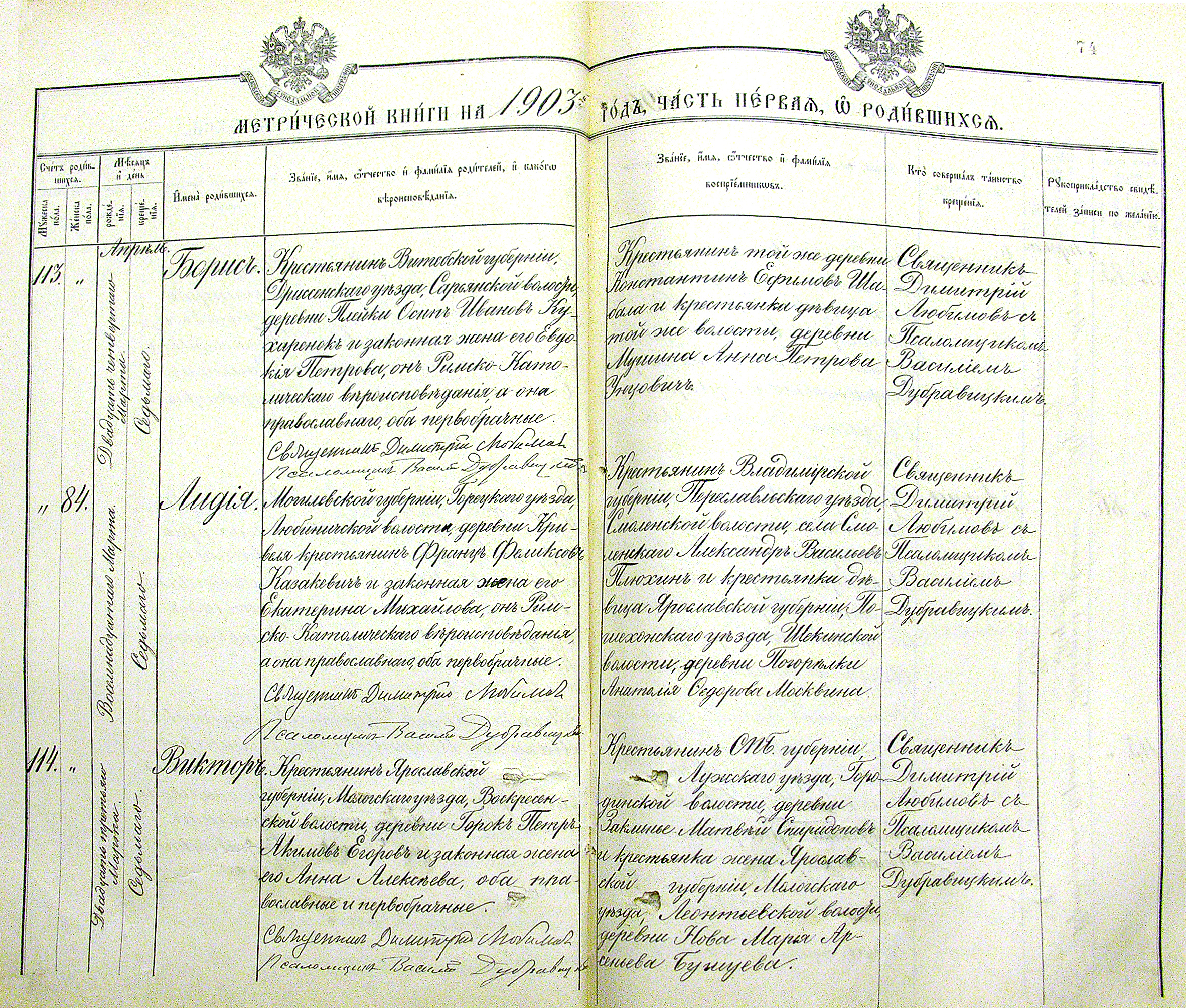 Разворот раздела "О родившихся" метрической книги церкви Покрова Пресвятой Богородицы в Санкт-Петербурге, 1903 год.